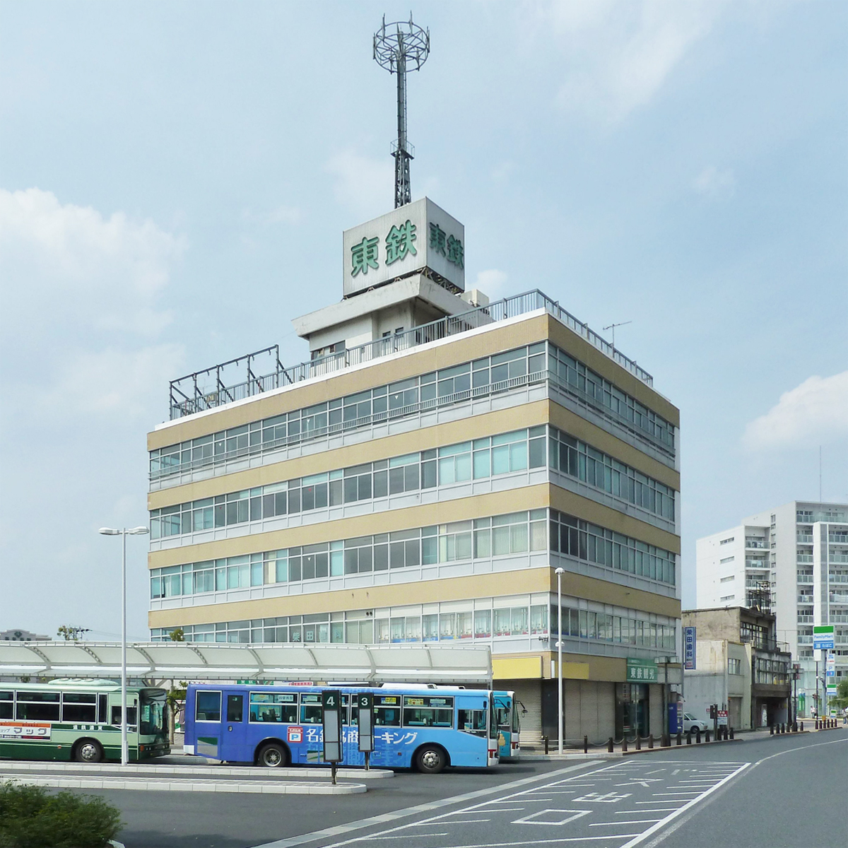 長年、本社が置かれていた東鉄ビル